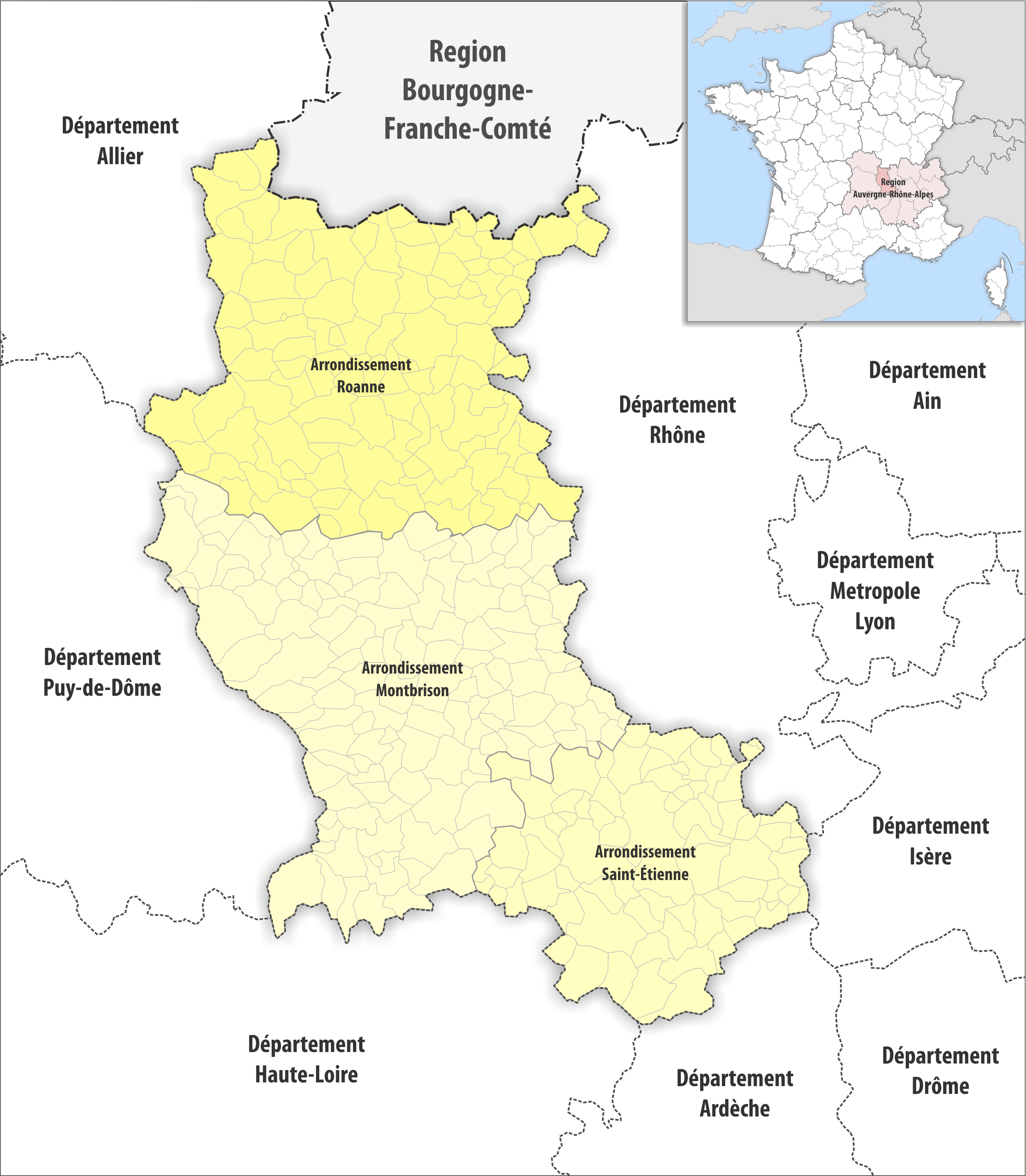 Gemeinden und Arrondissemente im Departement Loire